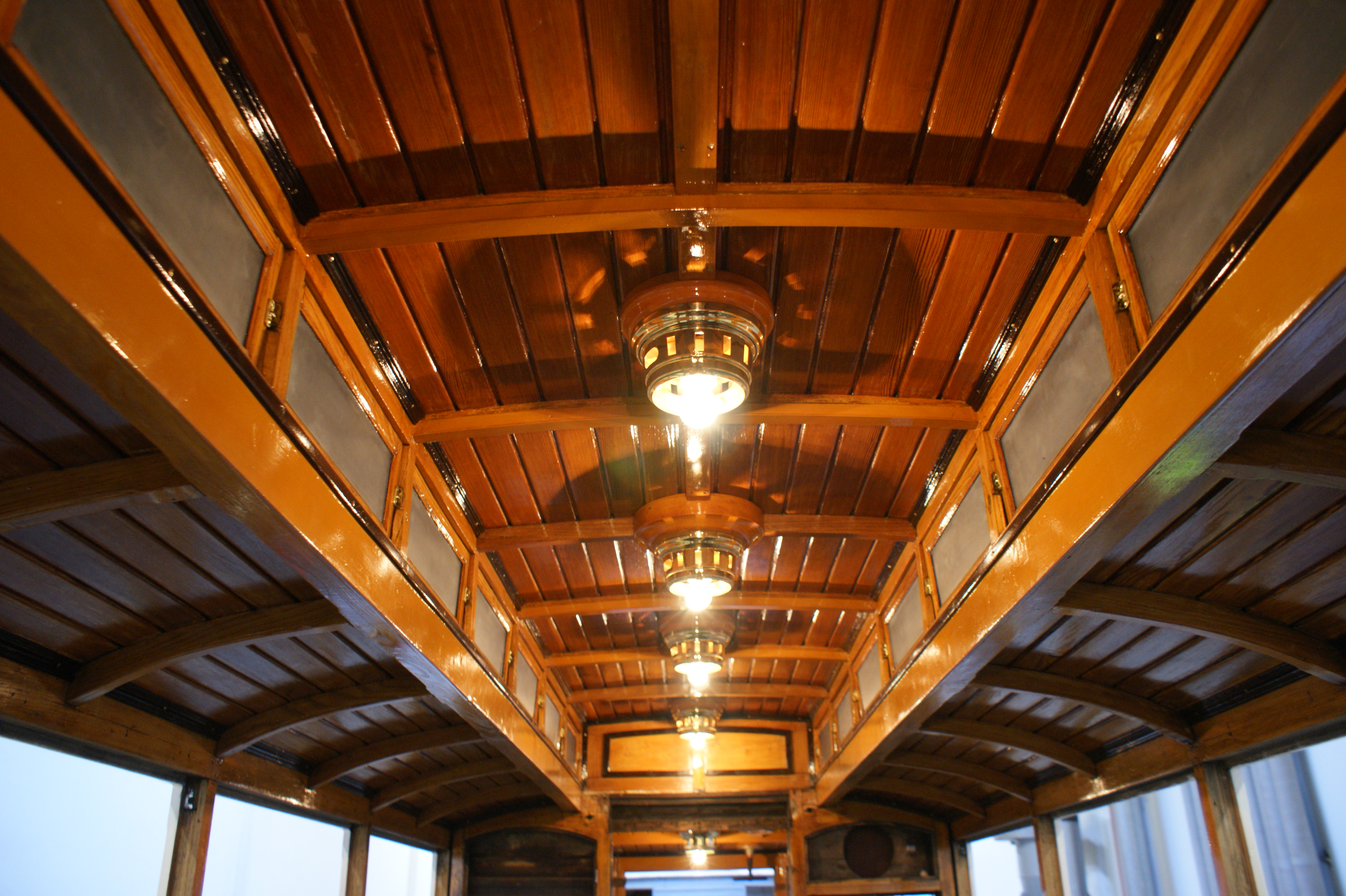 Laternendach von Triebwagen 53 der Innsbrucker Straßenbahn, restauriert im Zustand der 30er Jahre von den Tiroler MuseumsBahnen